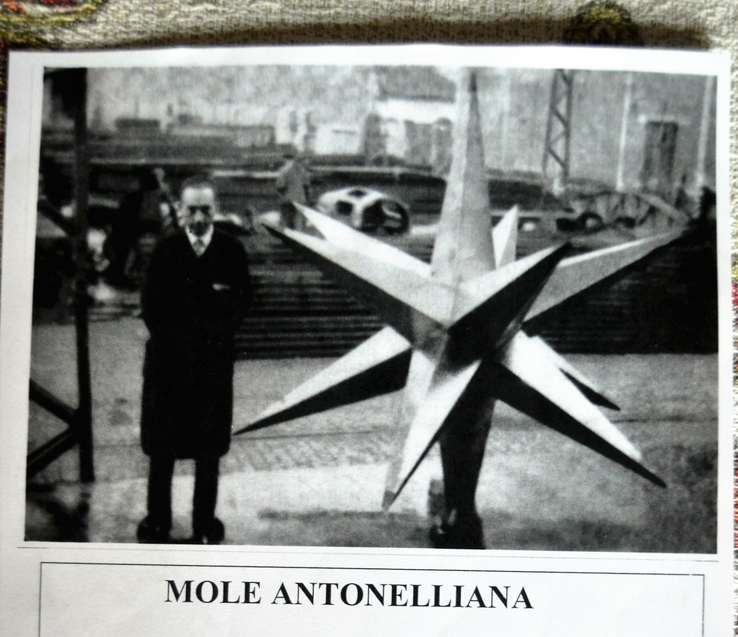 Il Cav. Perottino vicino alla stella